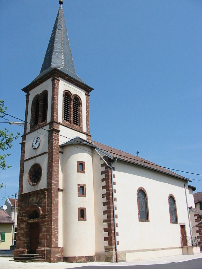 Ménarmont, commune des Vosges : église Saint-Florent